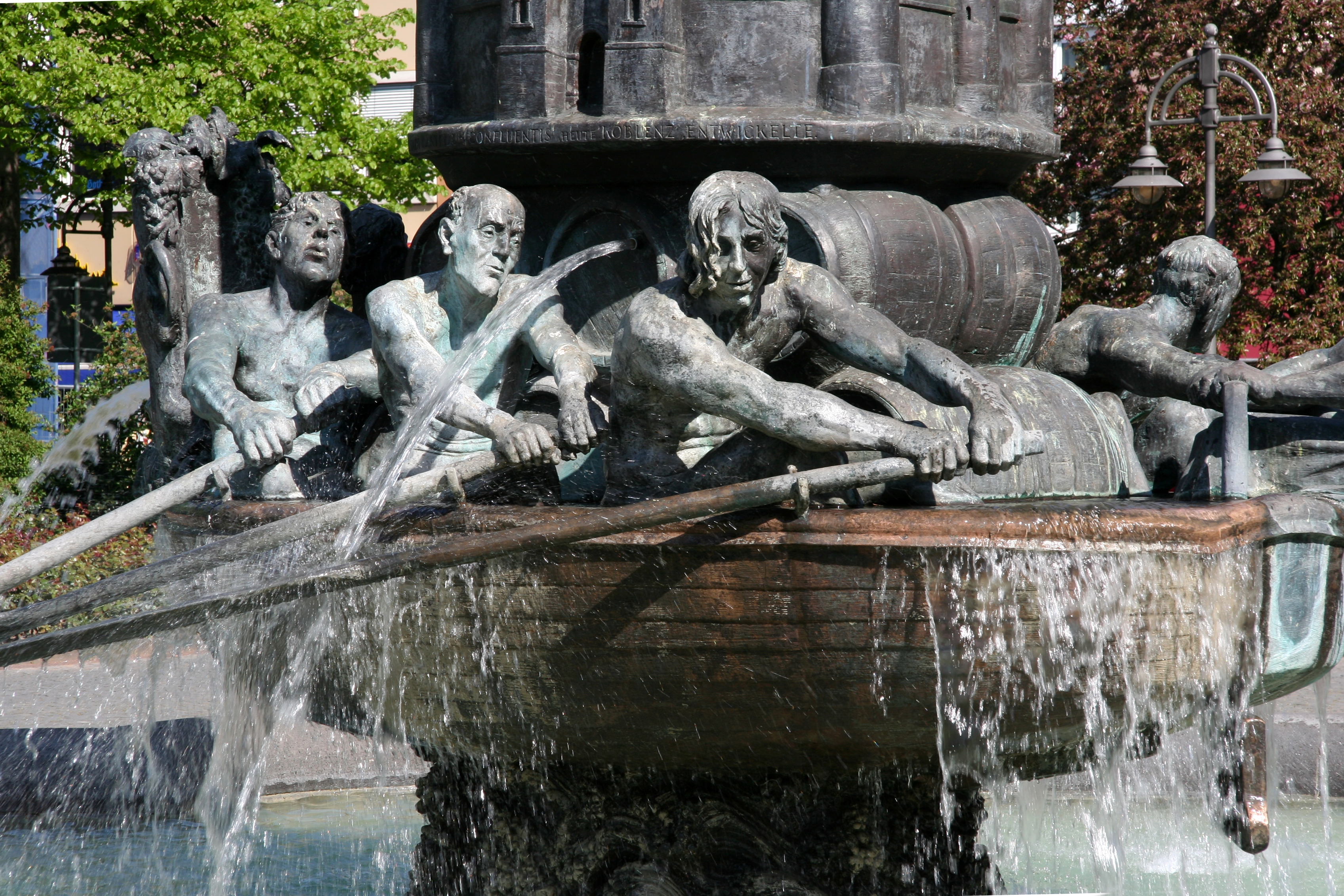 Detail der Historiensäule auf dem Josef-Görres-Platz in der Altstadt von Koblenz: Boot mit Weinfässern aus der Zeit der Römer am Rhein. Der Brunnen mit dieser Säule ist ein Geschenk des Landes Rheinland-Pfalz an die Stadt Koblenz zur 2000-Jahr-Feier 1992. Fertiggestellt wurde das Denkmal im Jahr 2000. Geschaffen hat es der Bildhauer Jürgen Weber.